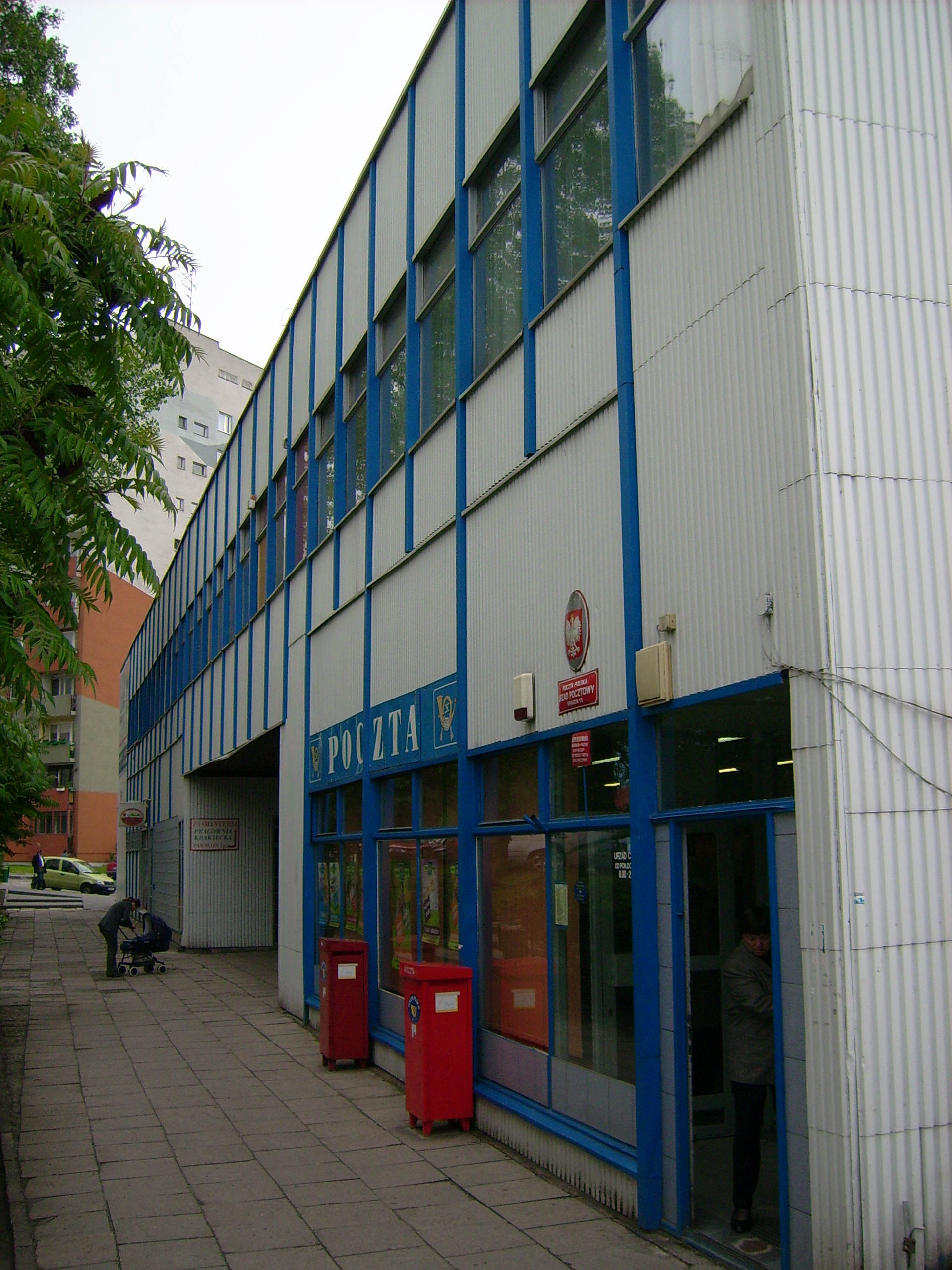 pl - pawilon, poczta, Kraków Piaski Nowe. en - post office, Cracov Piaski Nowe. author - Dar.k